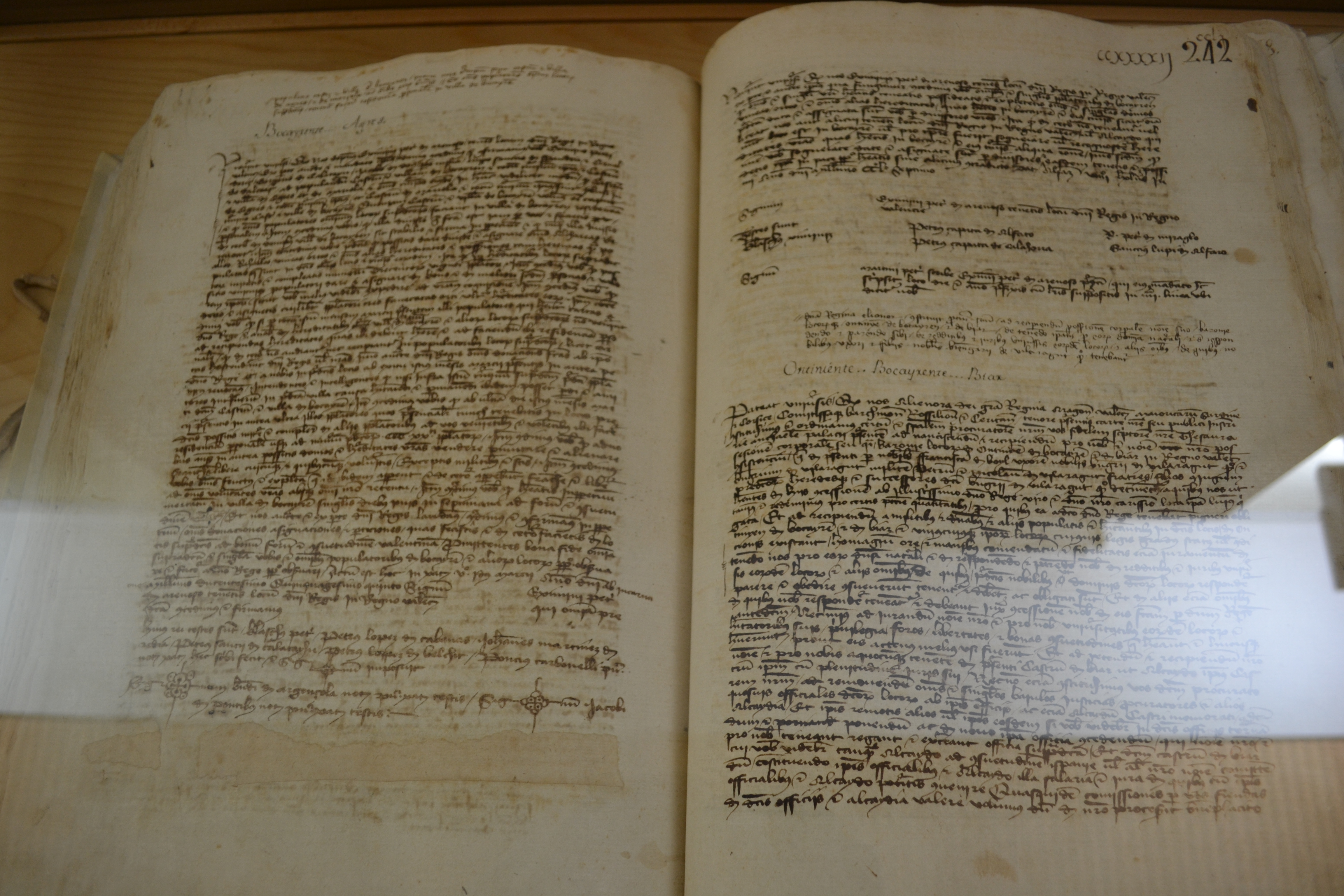 Eximén Pérez d'Arenós, Lloctinent del regne de Valéncia, amb autoritat de Jaume I, concedeix carta pobla a Bocairent, Agres i Mariola, per a un total de 320 repobladors i a fur de Valéncia (11 de març de 1256, Xàtiva). ARV: Reial Cancelleria, registre 614, fol.214v (còpia del segle XV). Arxiu del Regne de València